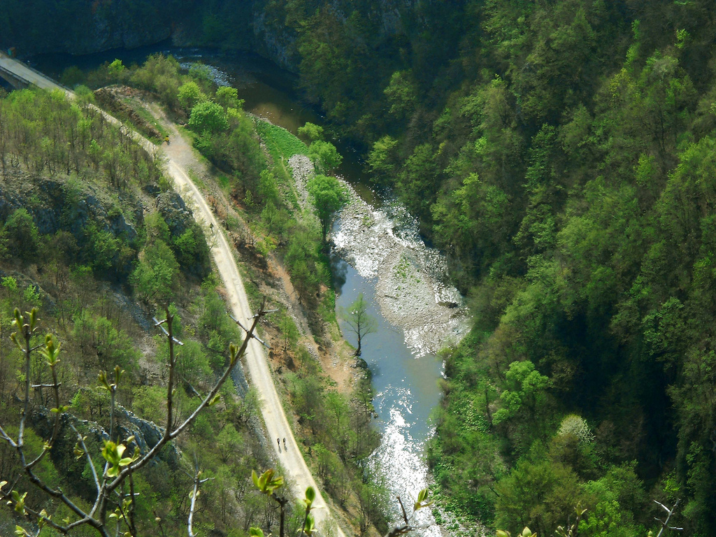 Jarní pohled na soutěsku řeky Đetinja